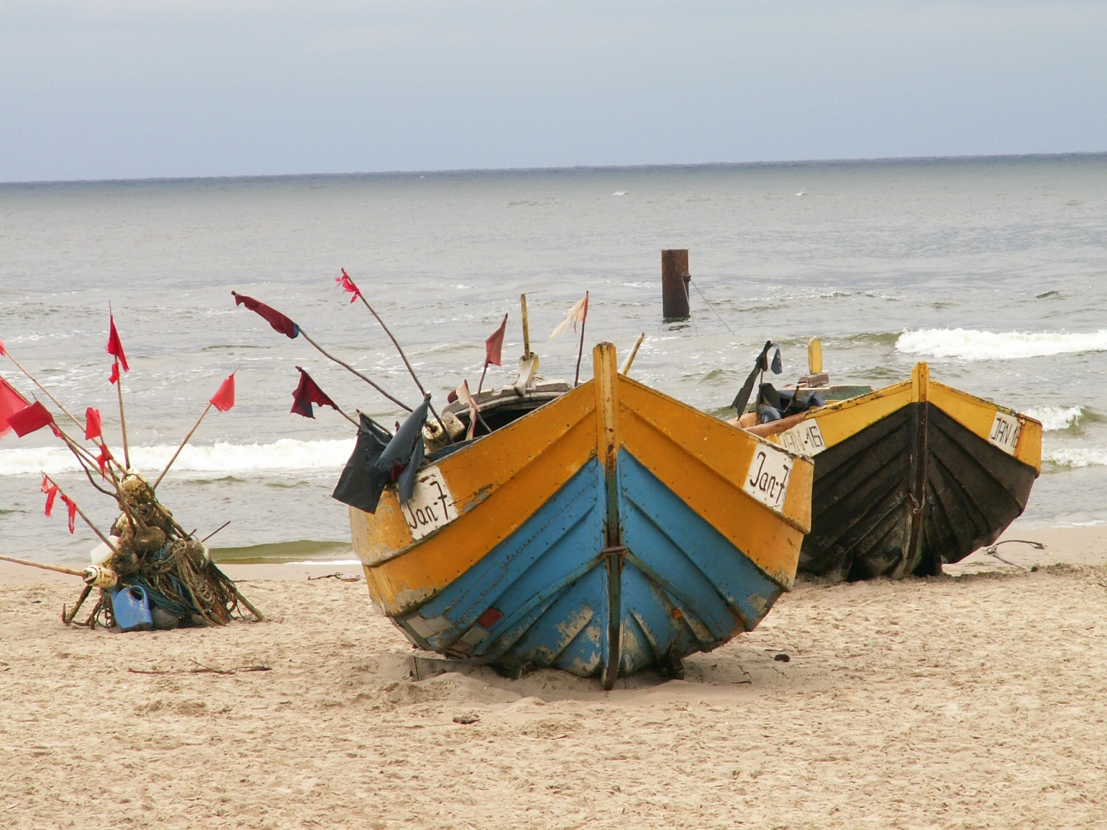 Fishing boats in Jantar / Kutry w jantarowym porcie, zdjęcie by h2onik, 12.08.2006